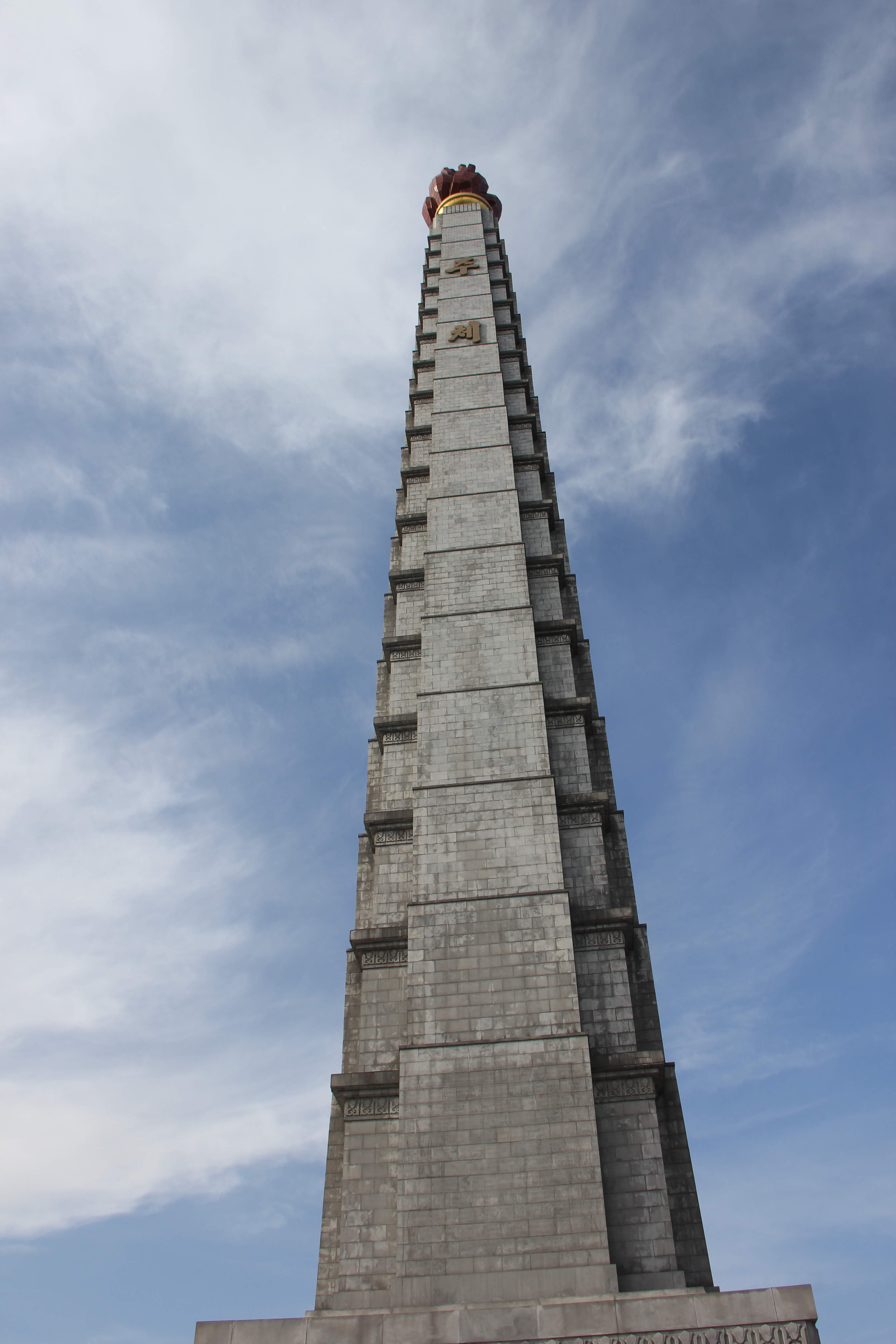 Juche Tower